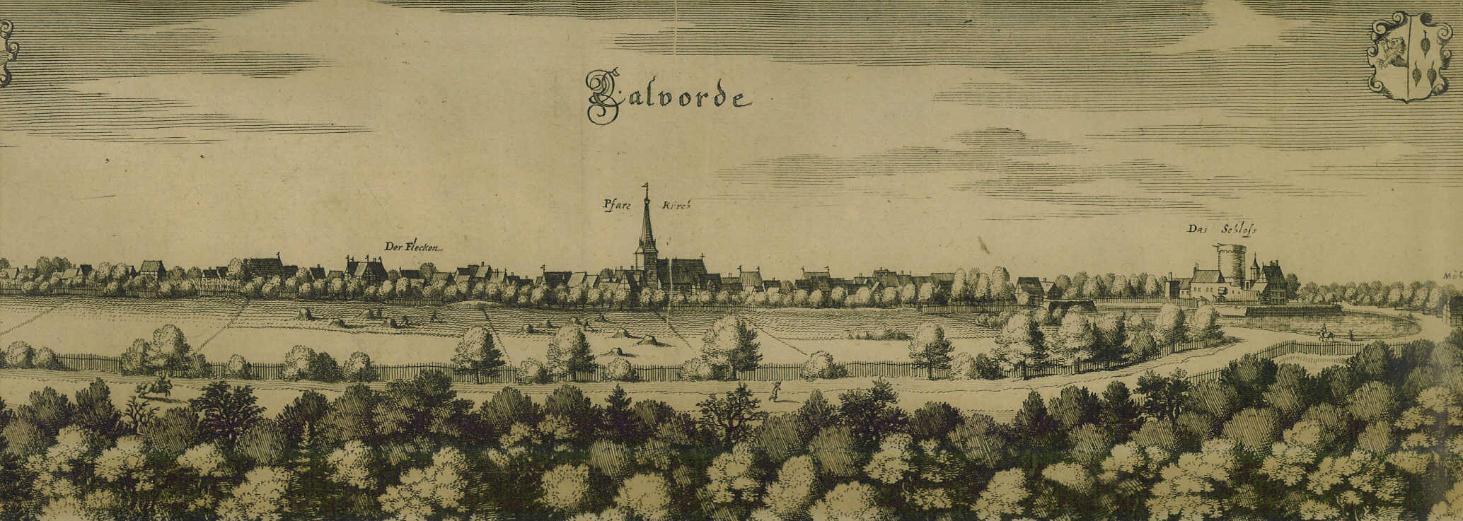 Stadt und Burg Calvörde - Stich von Merian